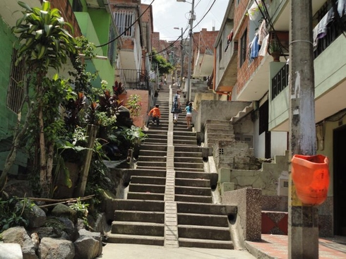 mi ciudad